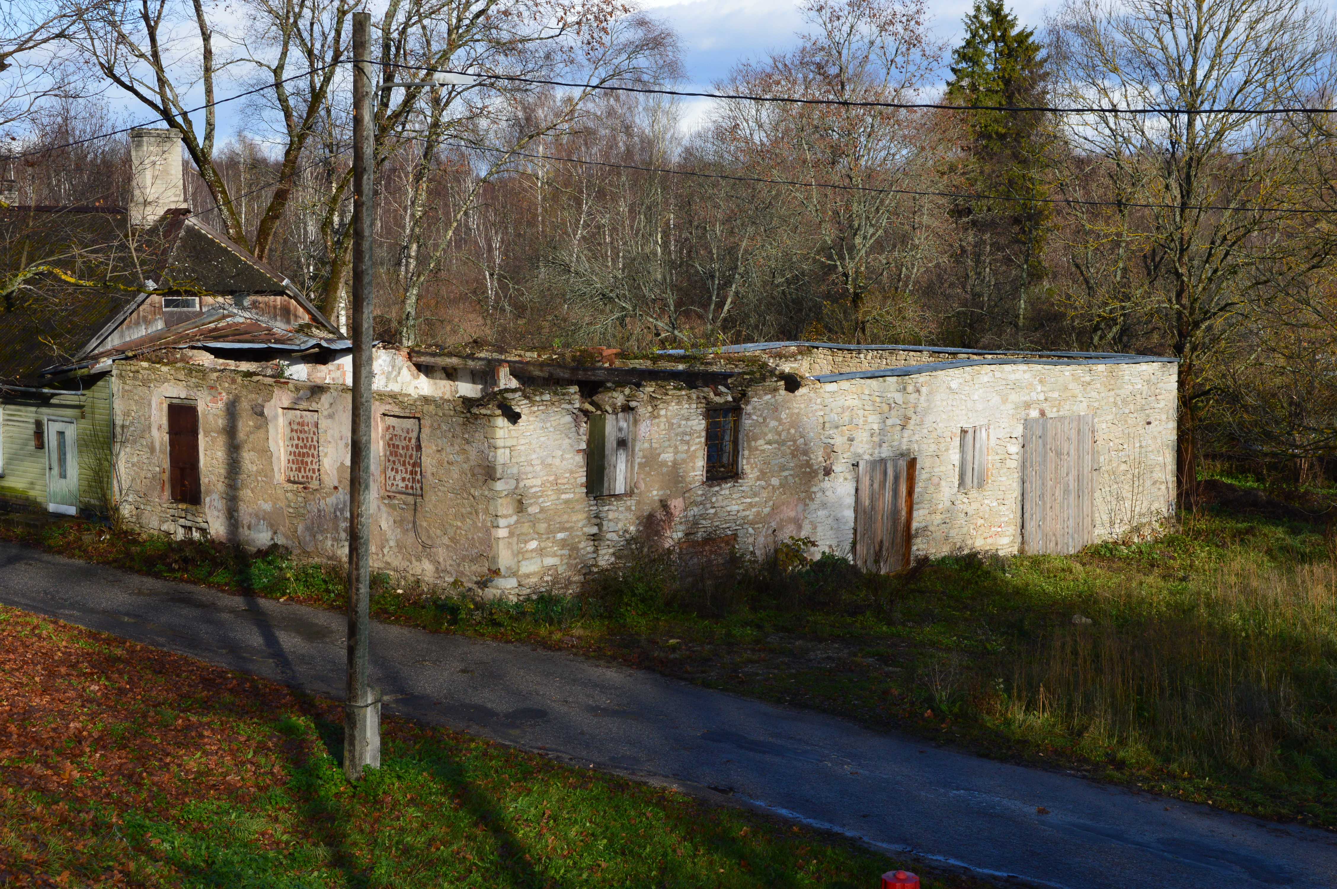 Simsoni vesiveski Paides